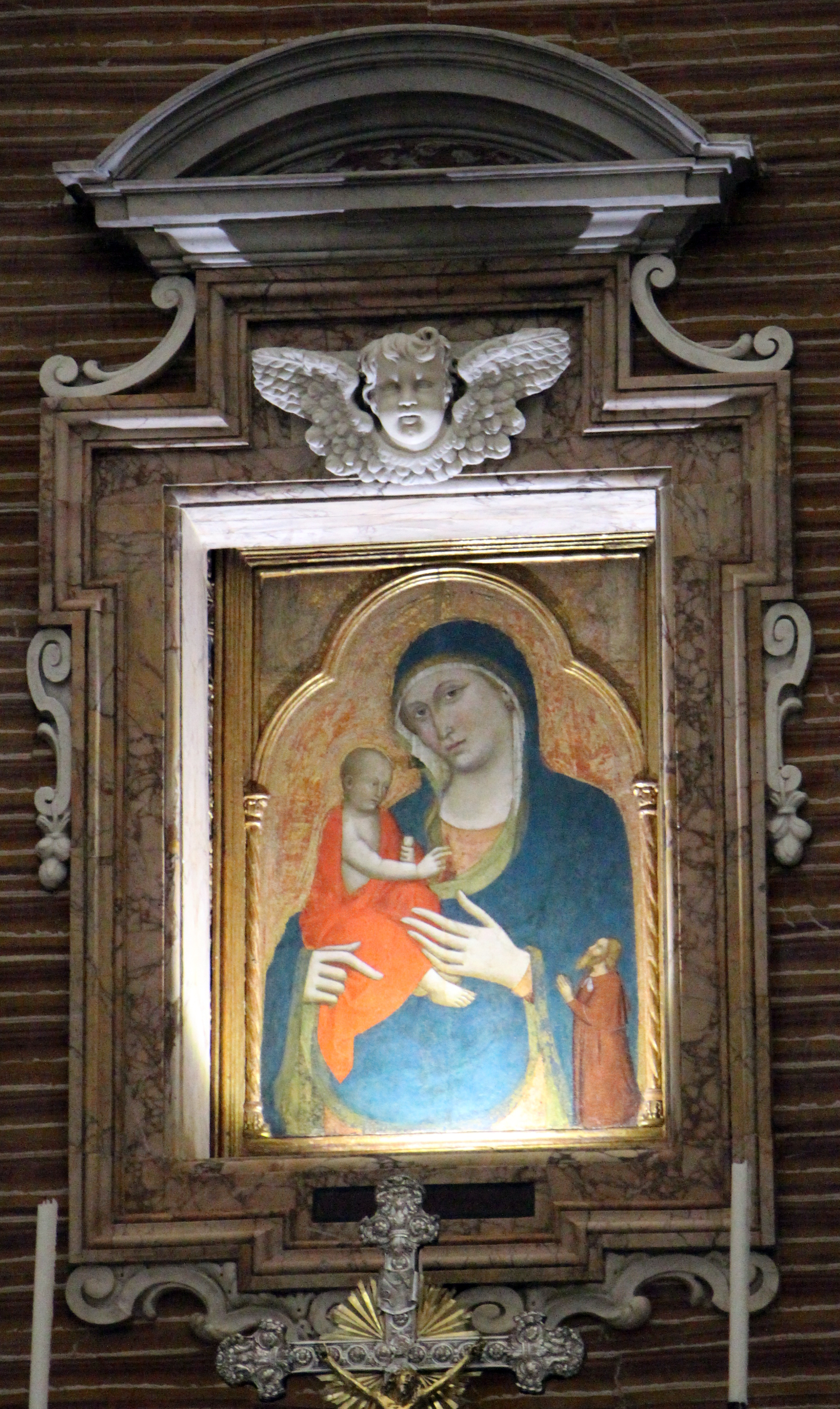 Sassari